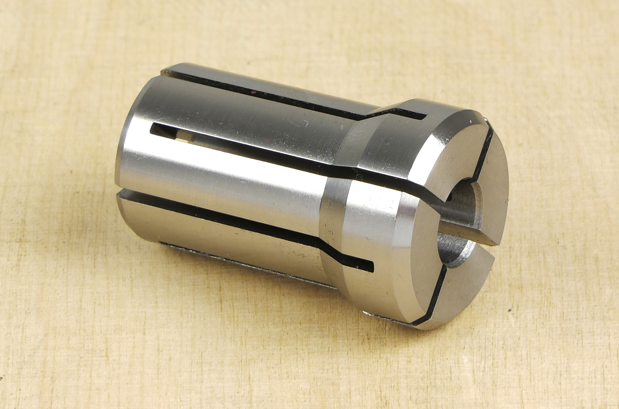 Tulejki zaciskowe DA (Double Angle) produkowane są przez takie firmy jak Universal Engineering, Kennametal, Erickson, Smith Tool, Lyndex i wiele innych. Nie nadają się do operacji frezowania.